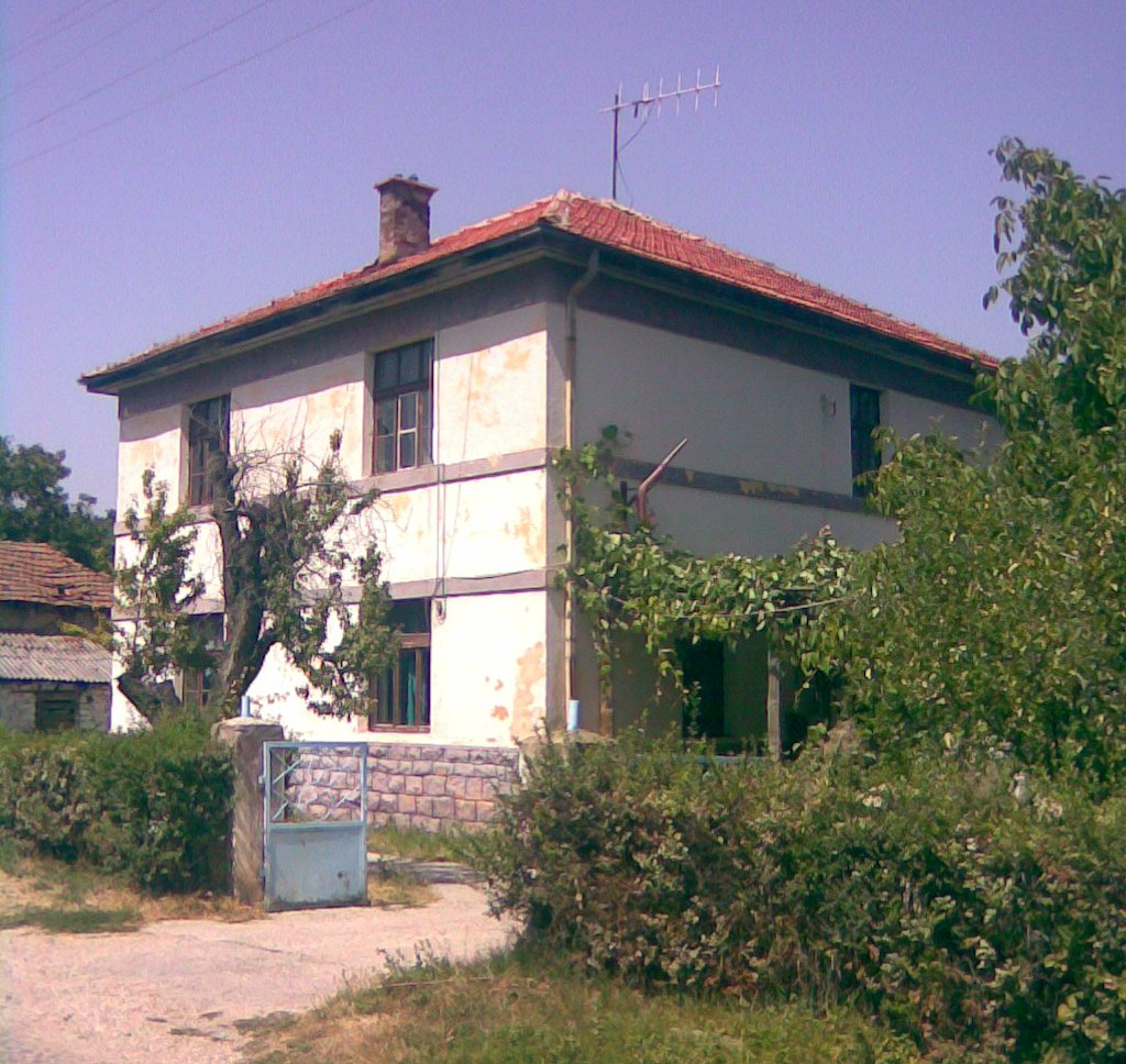 Зграда на Полициска станица с.Кажани